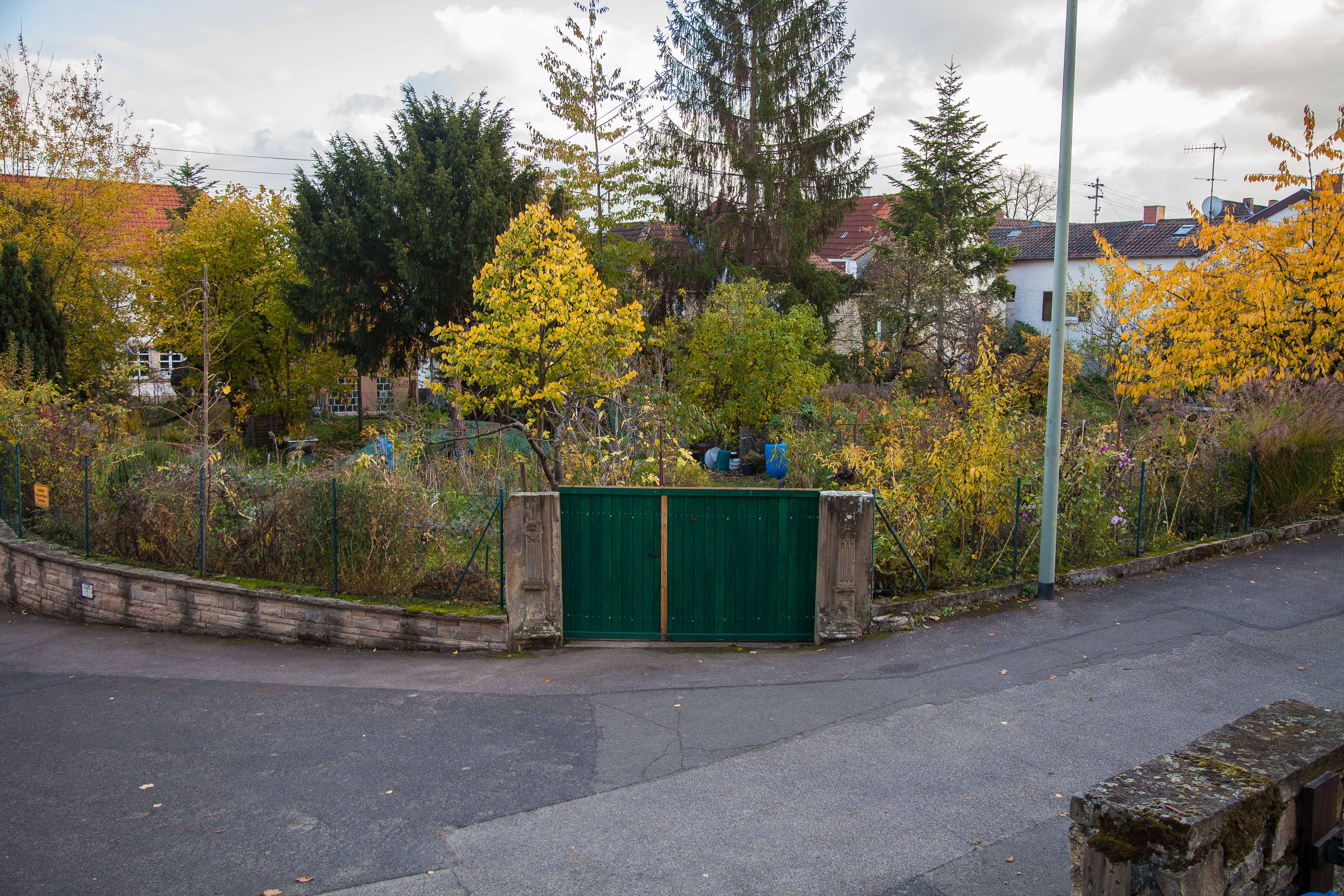 Ehemaliger Pfarrgarten mit kreuzförmigem Wegesystem, Reste der Renaissance-Toranlage